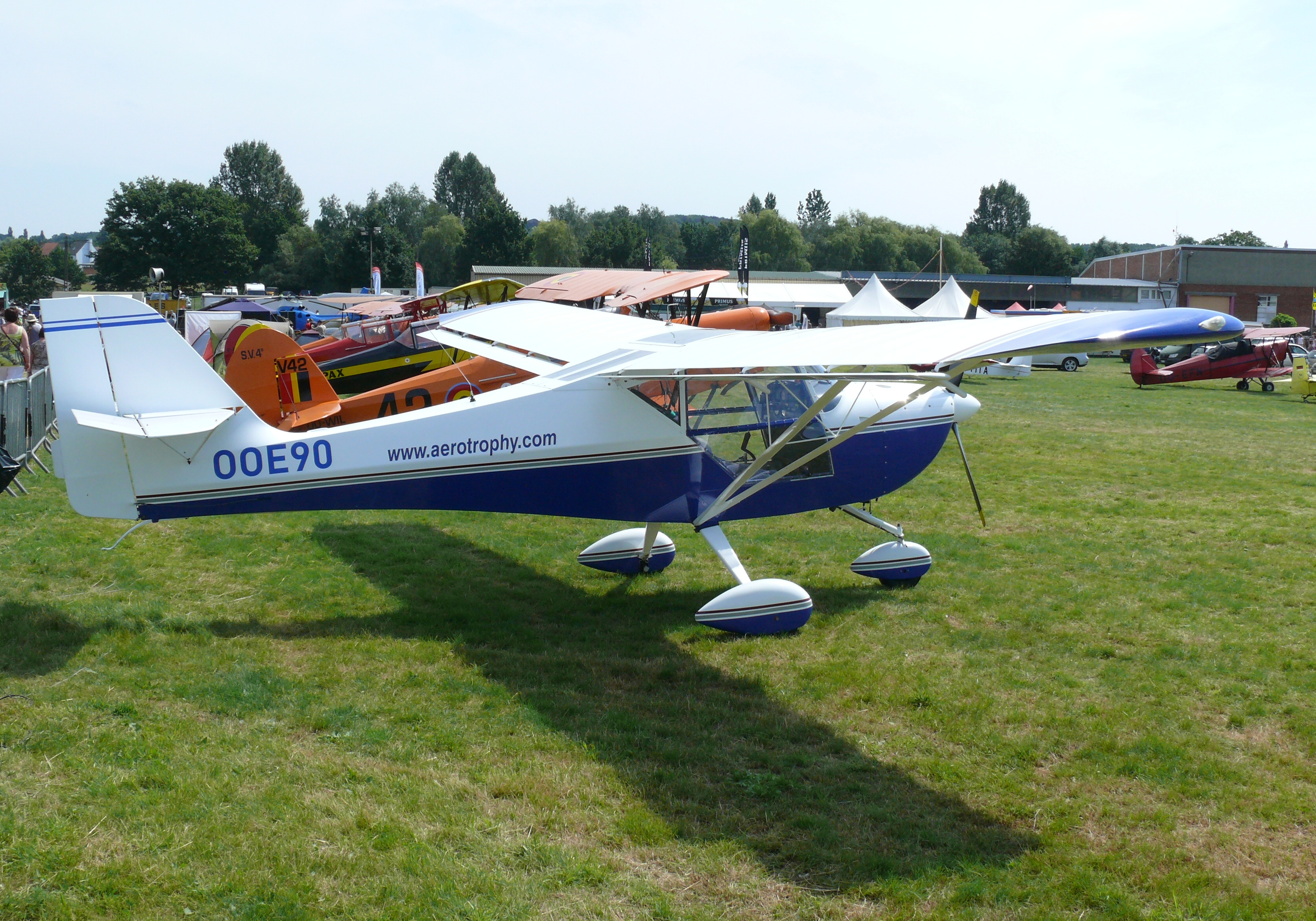 Aeropro Eurofox OO-E90 (c/n 17005) op de Schaffen Fly and Drive In 2012.